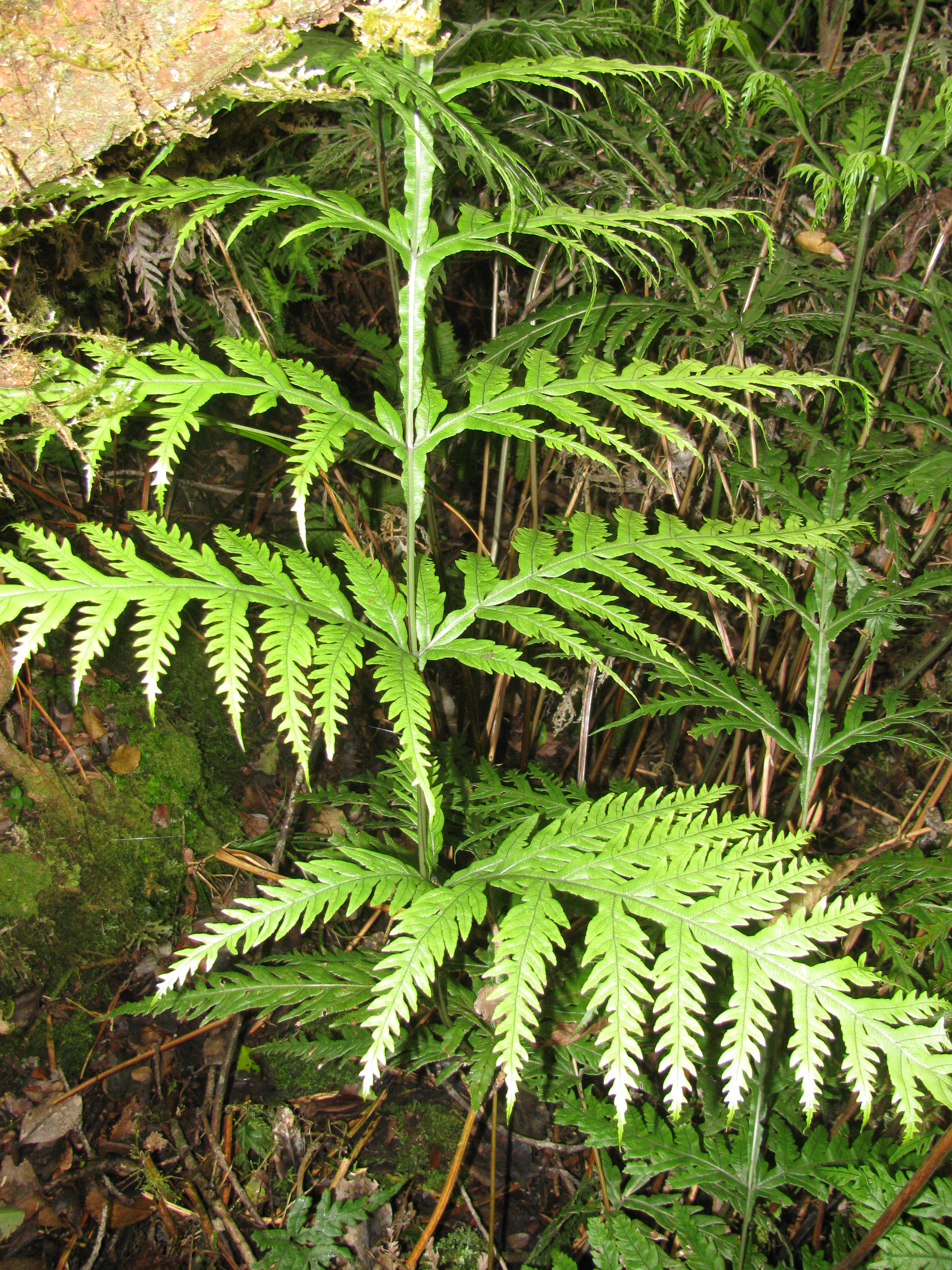 Pteris irregularis (Mana, ahewa, iwa puakea) Habit at Ainahou Bowl Koolau Gap, Maui, Hawaii. July 13, 2011 #110713-7360 Image Use Policy